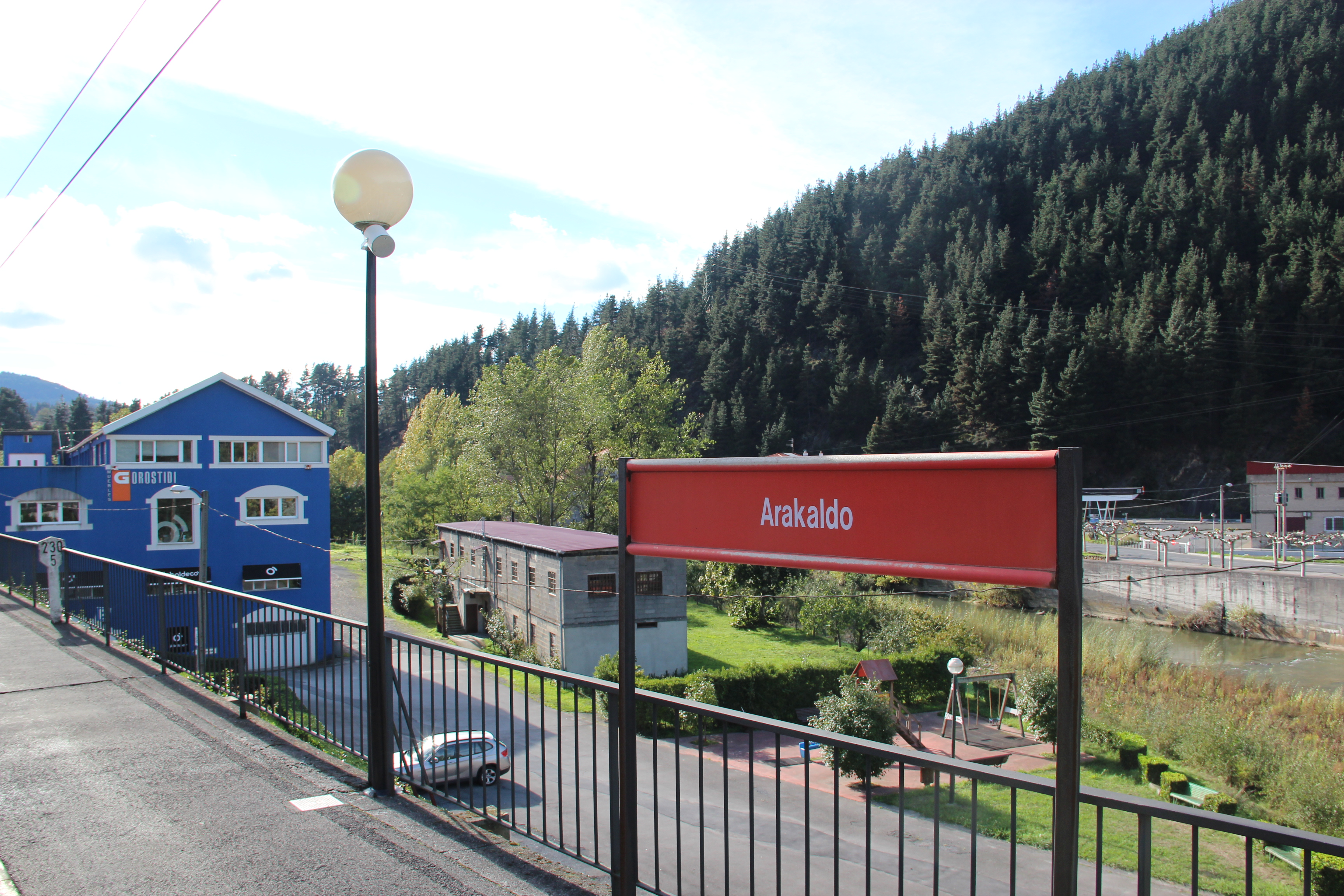 Estación de cercanías RENFE de Arakaldo.